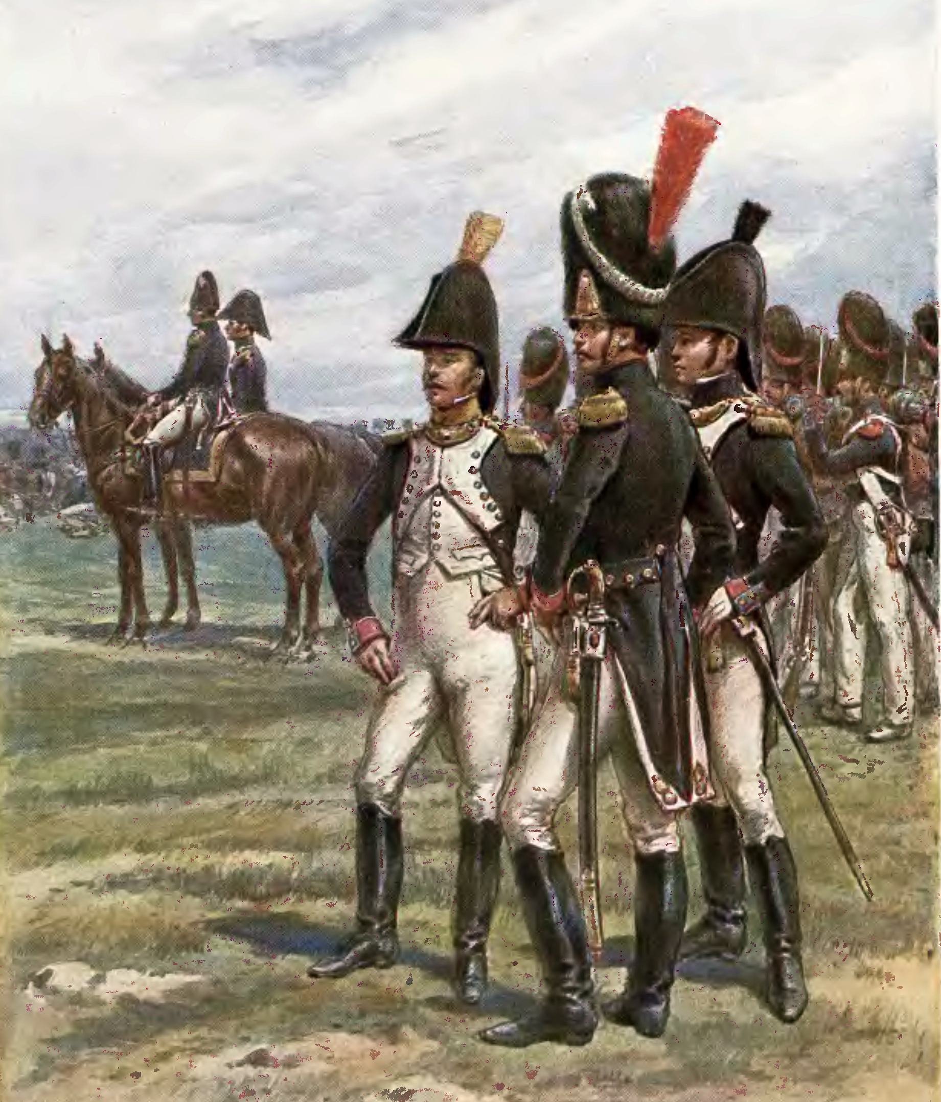 Piechota Księstwa Warszawskiego Królestwa Kongresowwgo